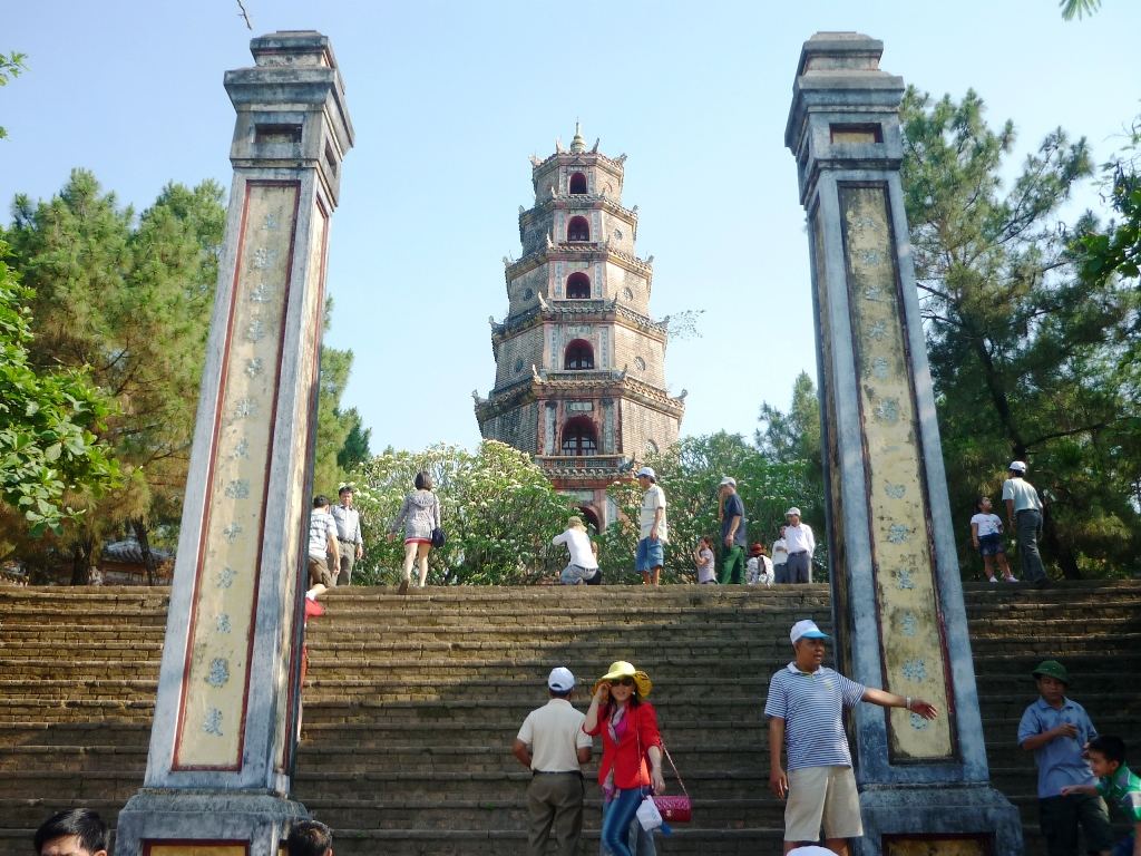 Thể loại:Chùa Thể loại:Chùa ở Huế Thể loại:Du lịch Huế Thể Loại:Di tích cố đô Huế